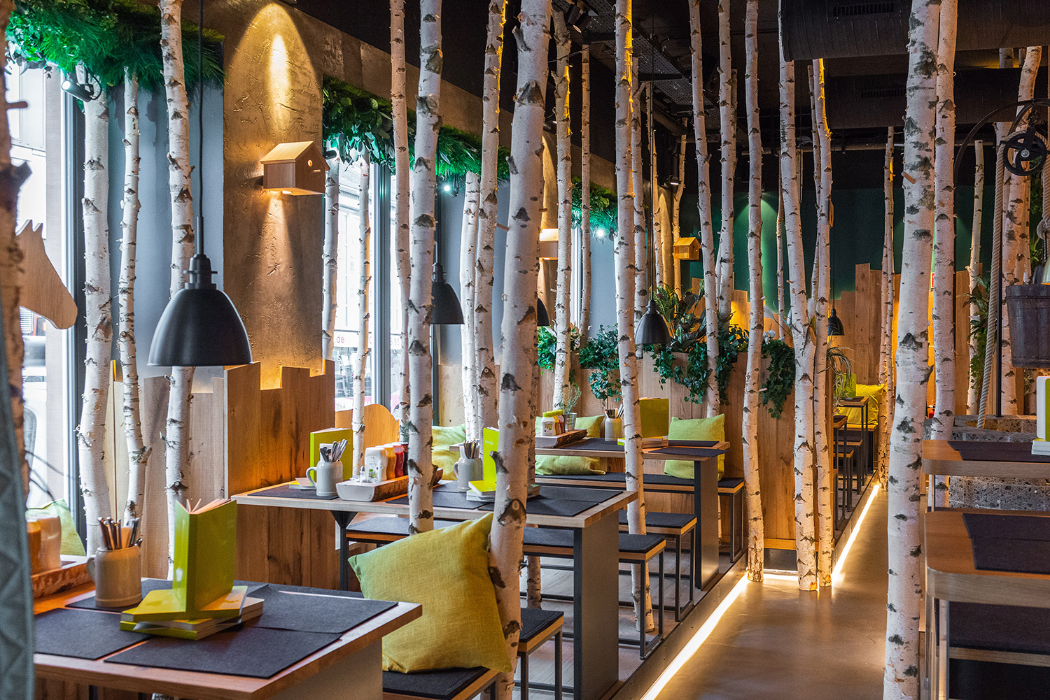 Typischer Gastraum eines Hans im Glück-Restaurants mit Birkenstämmen (2020)